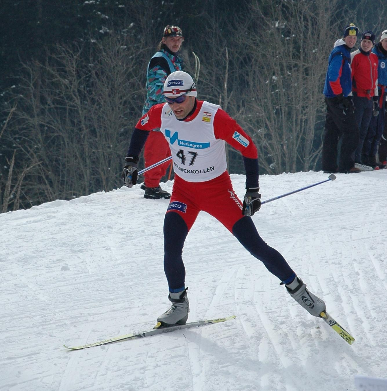 Kristen Skjeldal i Holmenkollen 2006